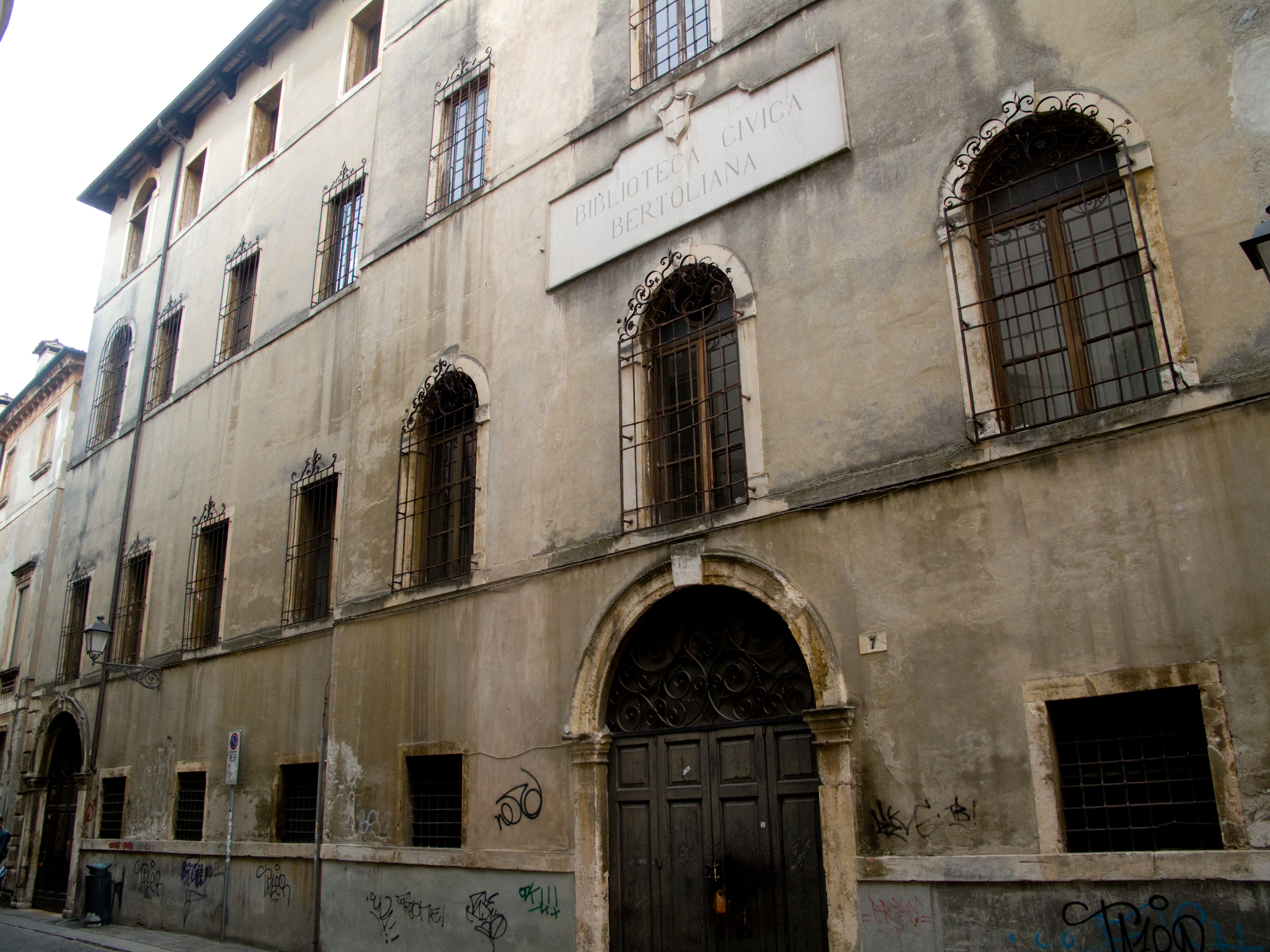 Vicenza - Convento di San Giacomo, sede della Biblioteca Bertoliana